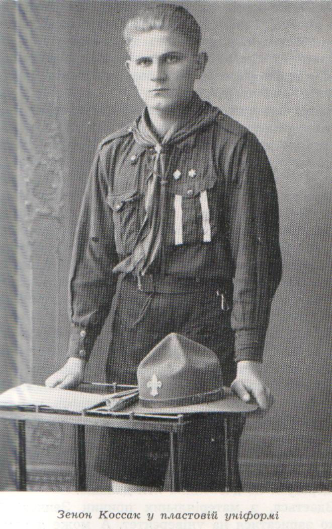 Зенон Коссак (1907-1939) в пластовому однострої